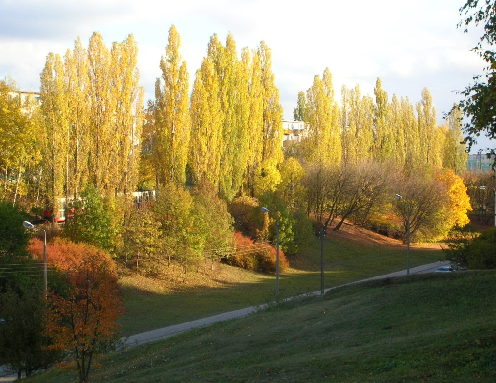 Jar ulicy Władysława Bełzy w Bydgoszczy